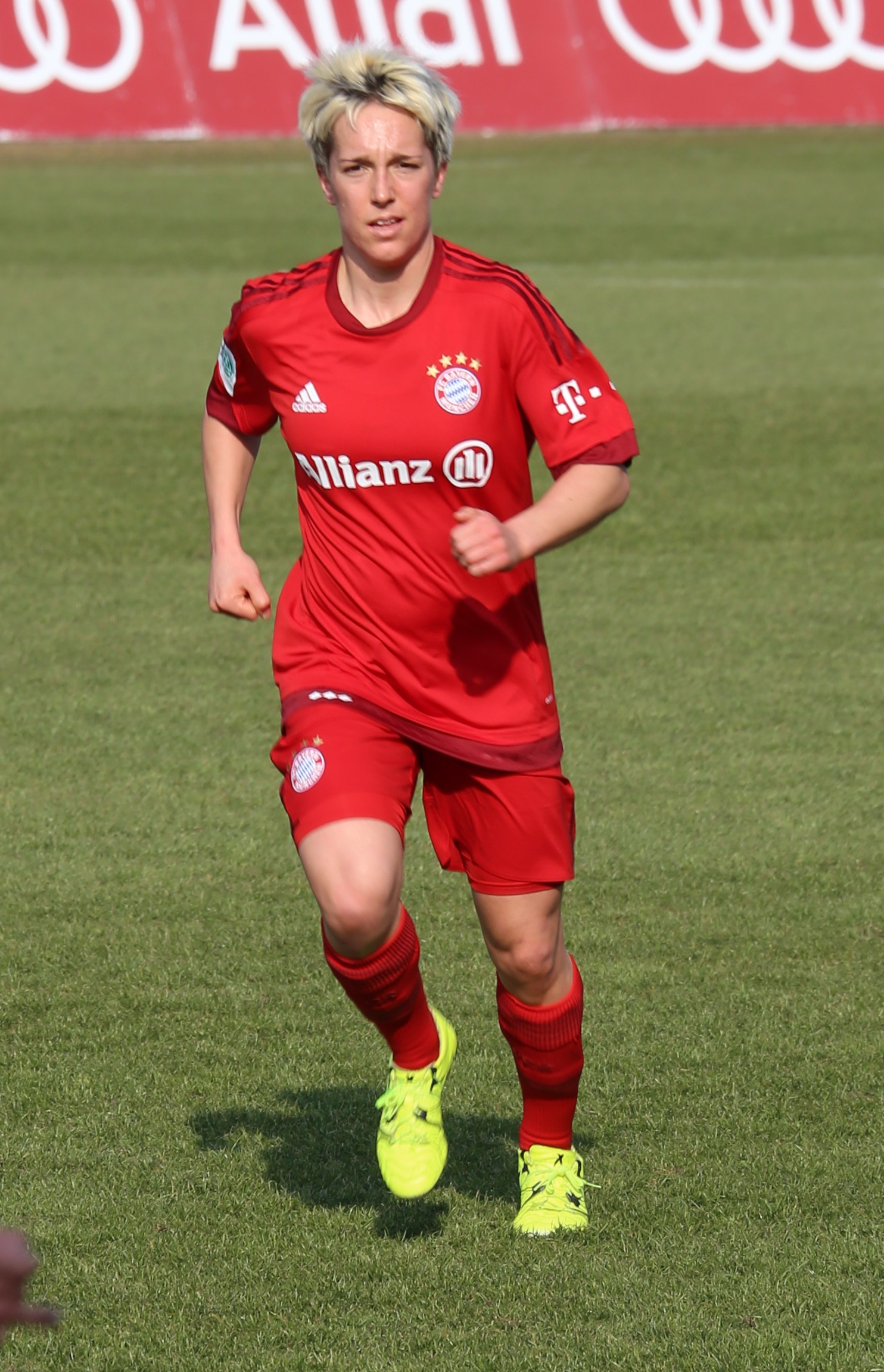 Claire Falknor (FC Bayern München) beim Frauen-Bundesliga-Spiel FC Bayern München gegen FF USV Jena am 19. März 2016 im Stadion an der Grünwalder Straße (Ergebnis war 5:1).